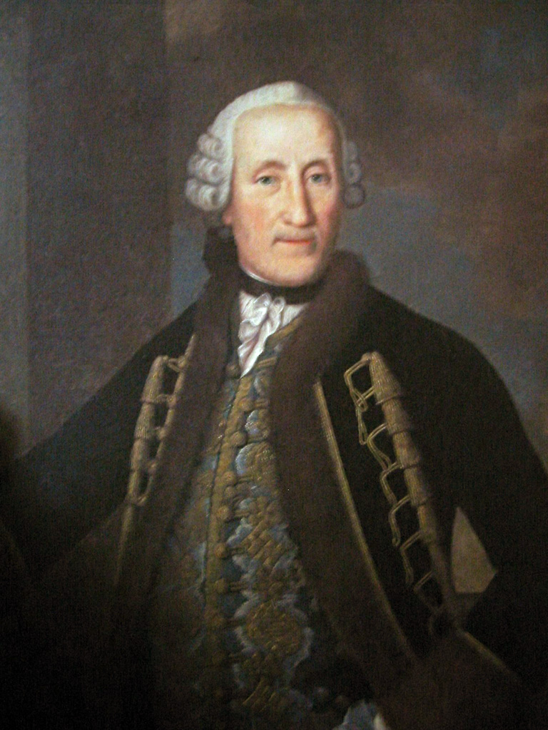 Porträt des Barockbaumeisters Friedrich Joachim Stengel